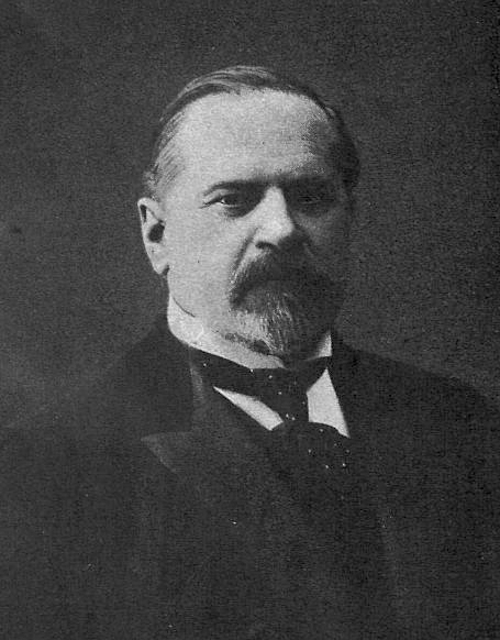 Васильев Александр Васильевич